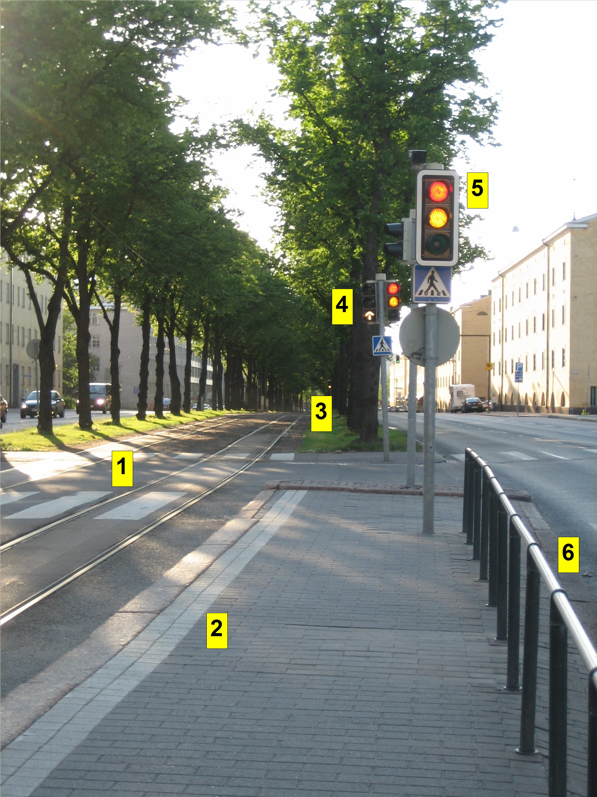 Safety measures at a tram stop, Mäkelänkatu, Helsinki, Finland.